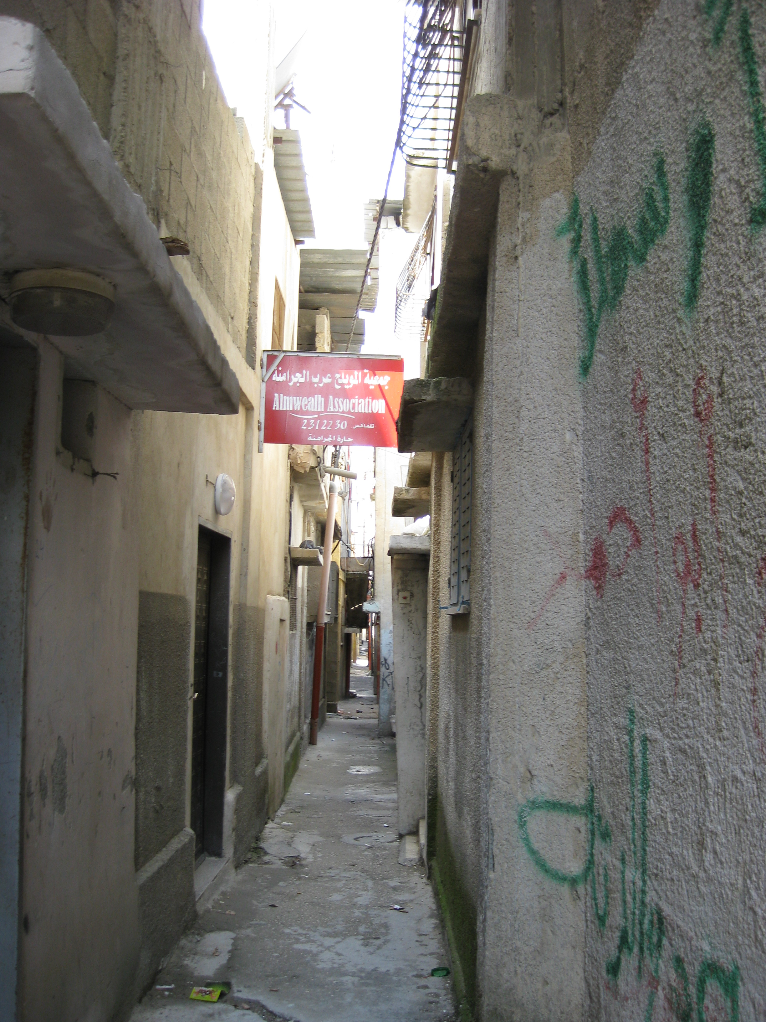 Balata Camp, Nablus, Palestine